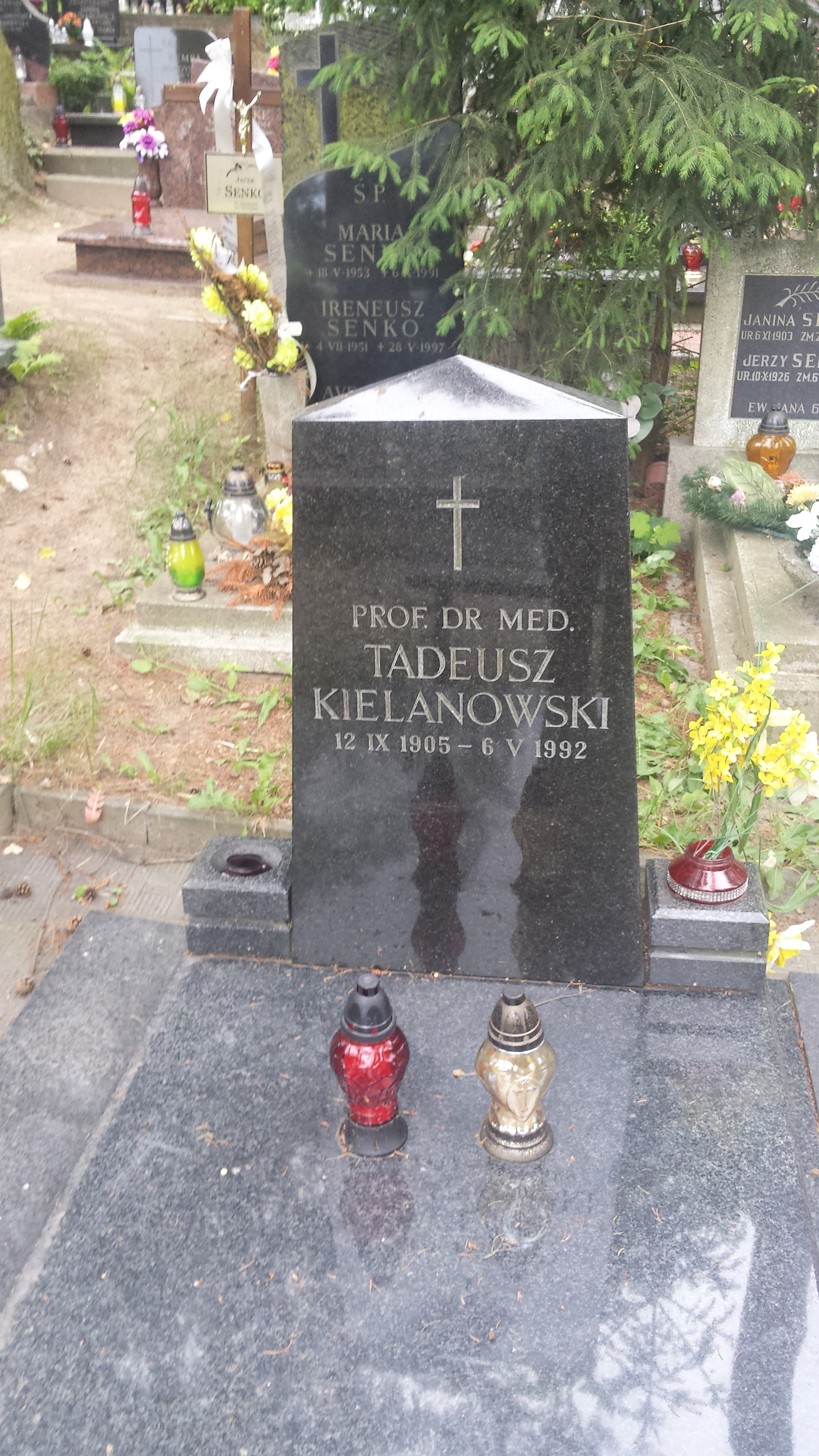 Grób lekarza prof. Tadeusza Kielanowskiego na Cmentarzu Srebrzysko w Gdańsku.